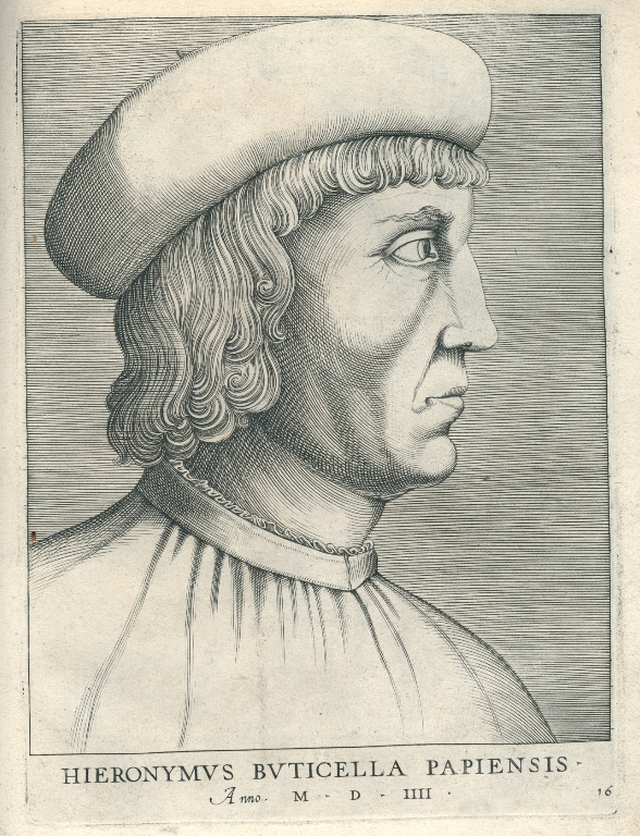 Girolamo Bottigella